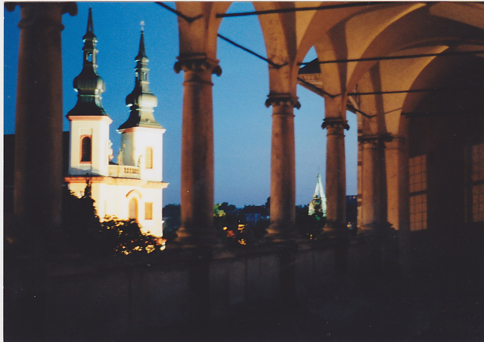 Rond middernacht bij volle maan genomen tijdens een feest op het kasteel te Litomysl (CZ). De lucht was geheel donker, dus toch niet. (sluitertijd automatisch, 400 ASA, f=2,8 (ca. 8 sec.))